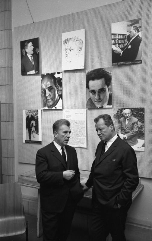 Exilanten-Tagung in Luxemburg Eröffnung der Ausstellung "Exil-Literatur" 17.-18.1.1968